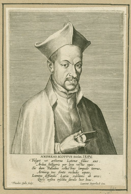 Andreas Schottus, jezuiët en latinist